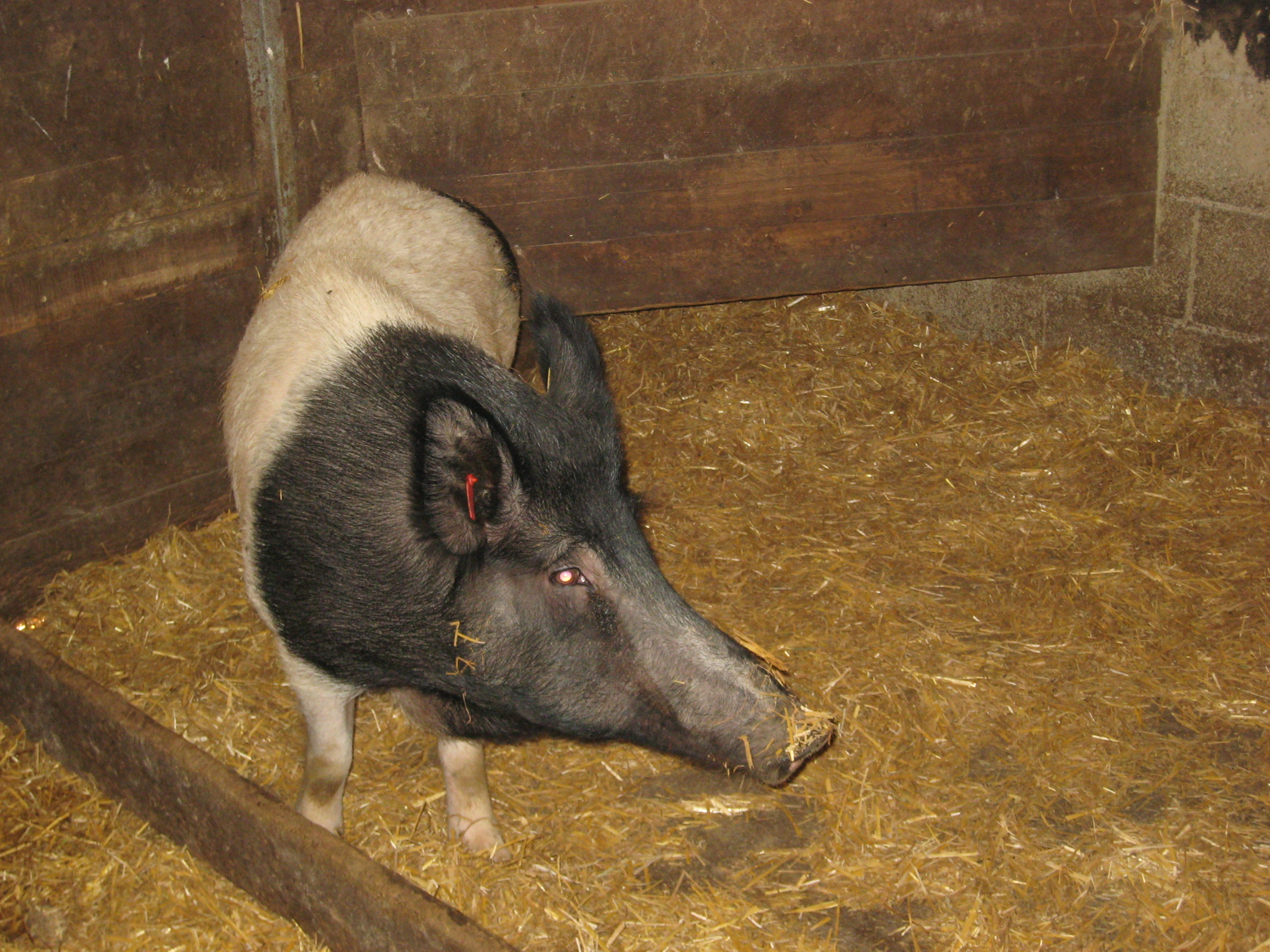 rückgezüchtetes Weideschwein im Bergischen Freilichtmuseum Lindlar